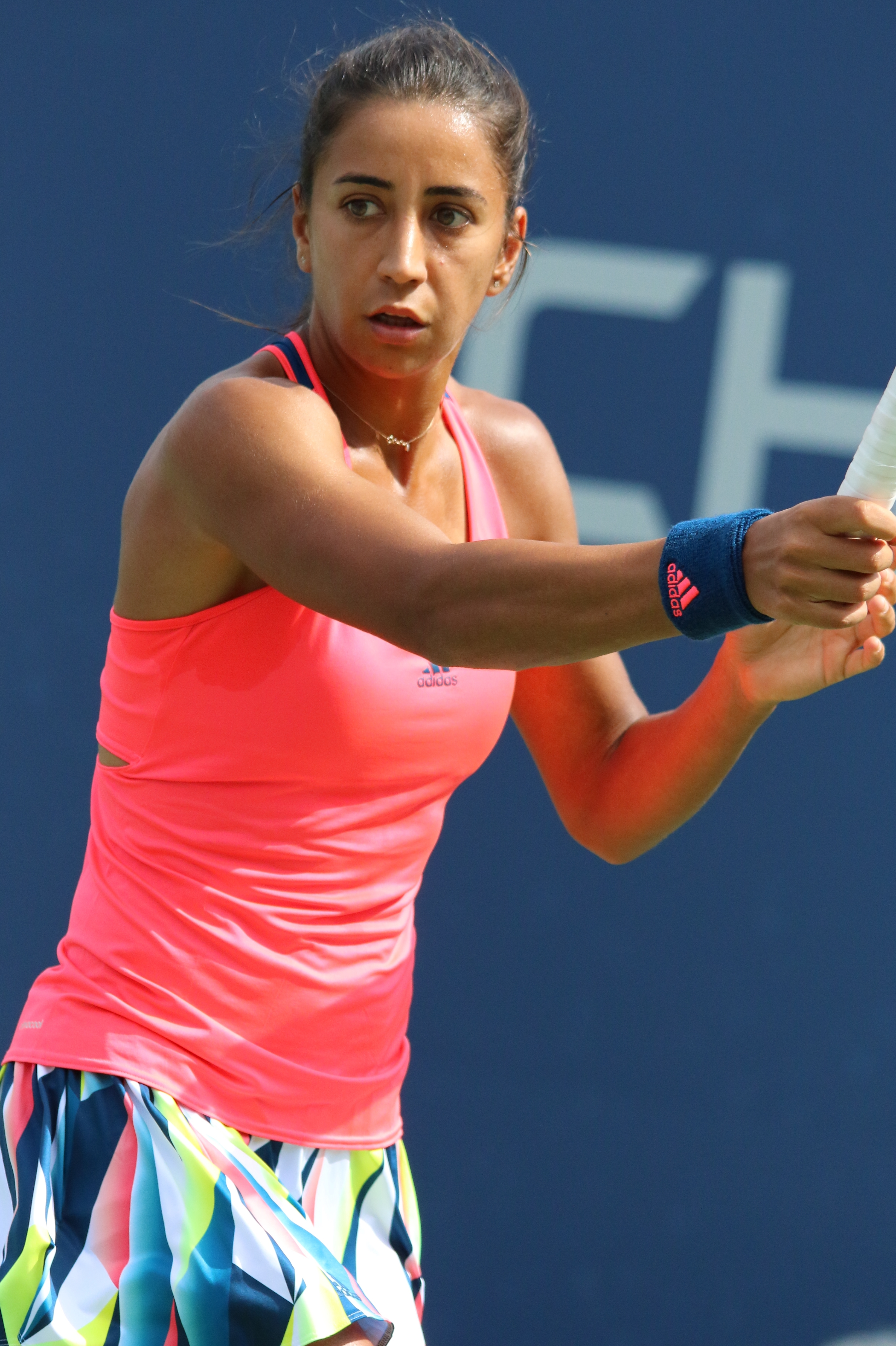 Buyukakcay US16 (1)